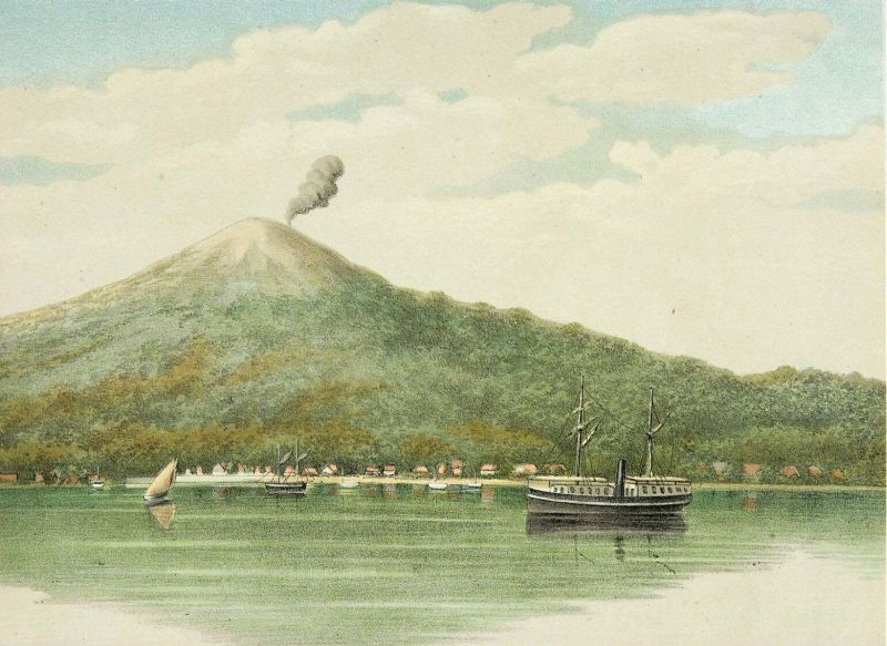 Litho. Litho naar een oorspronkelijke aquarel van Rappard. Uitzicht op Ternate